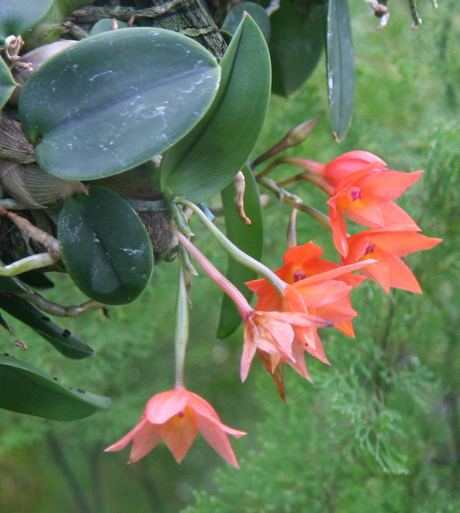 Sophronitis cernua im Botanischen Garten Dresden